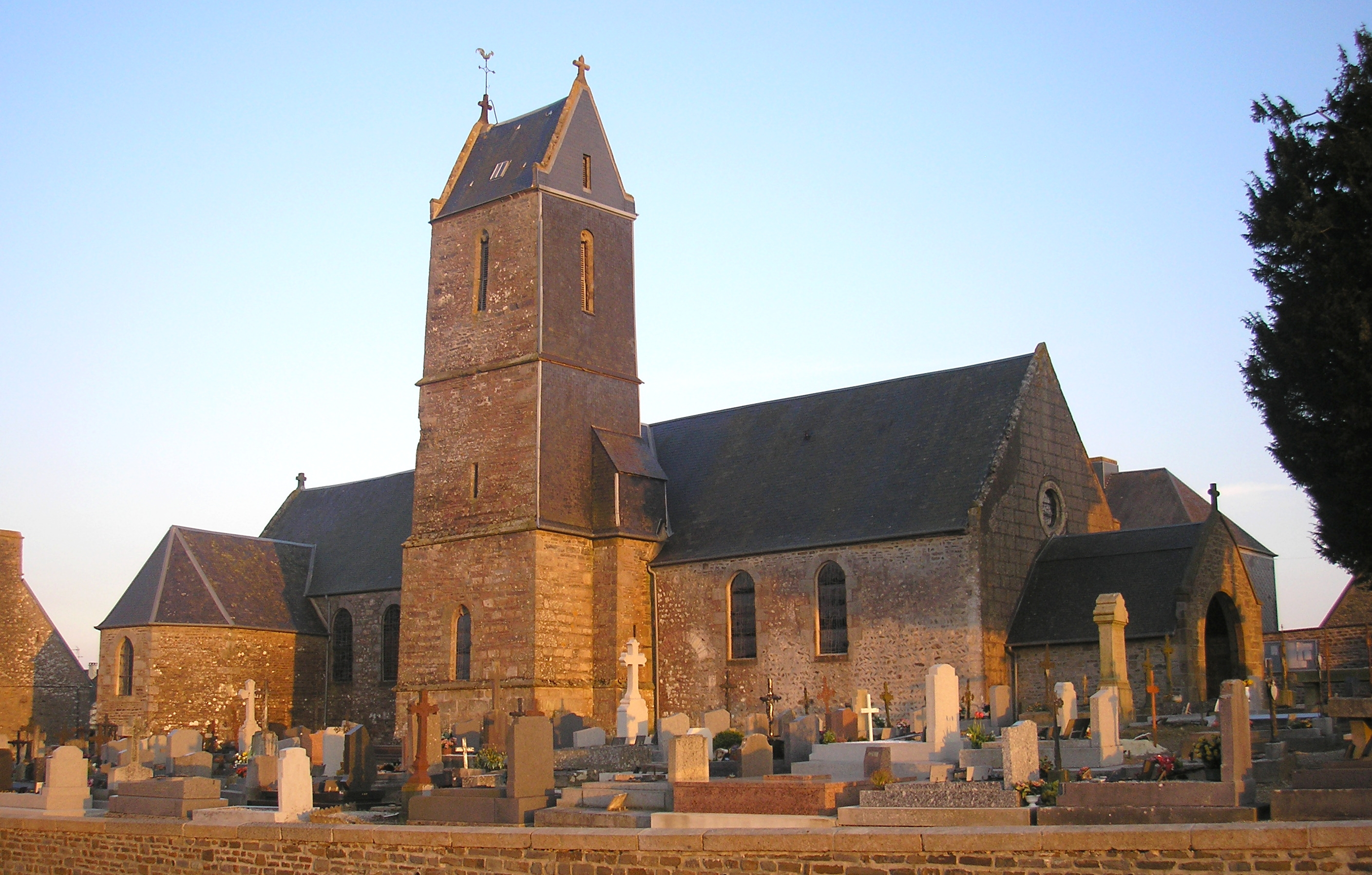 Vaudry (Normandie, France). L'église Saint-Martin.